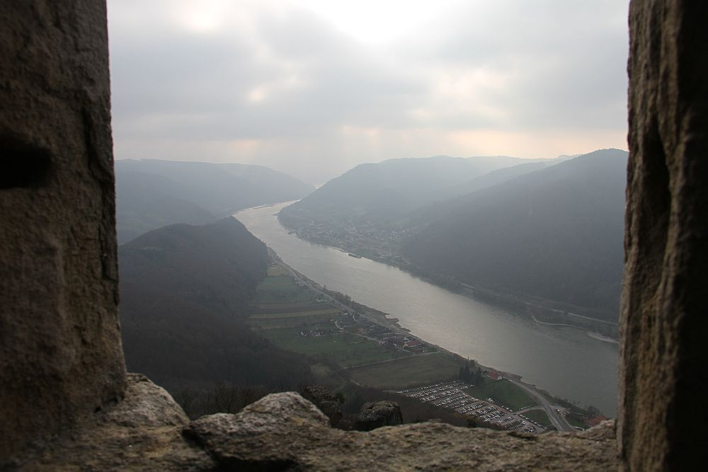 Ausblick von der Burgruine Aggstein